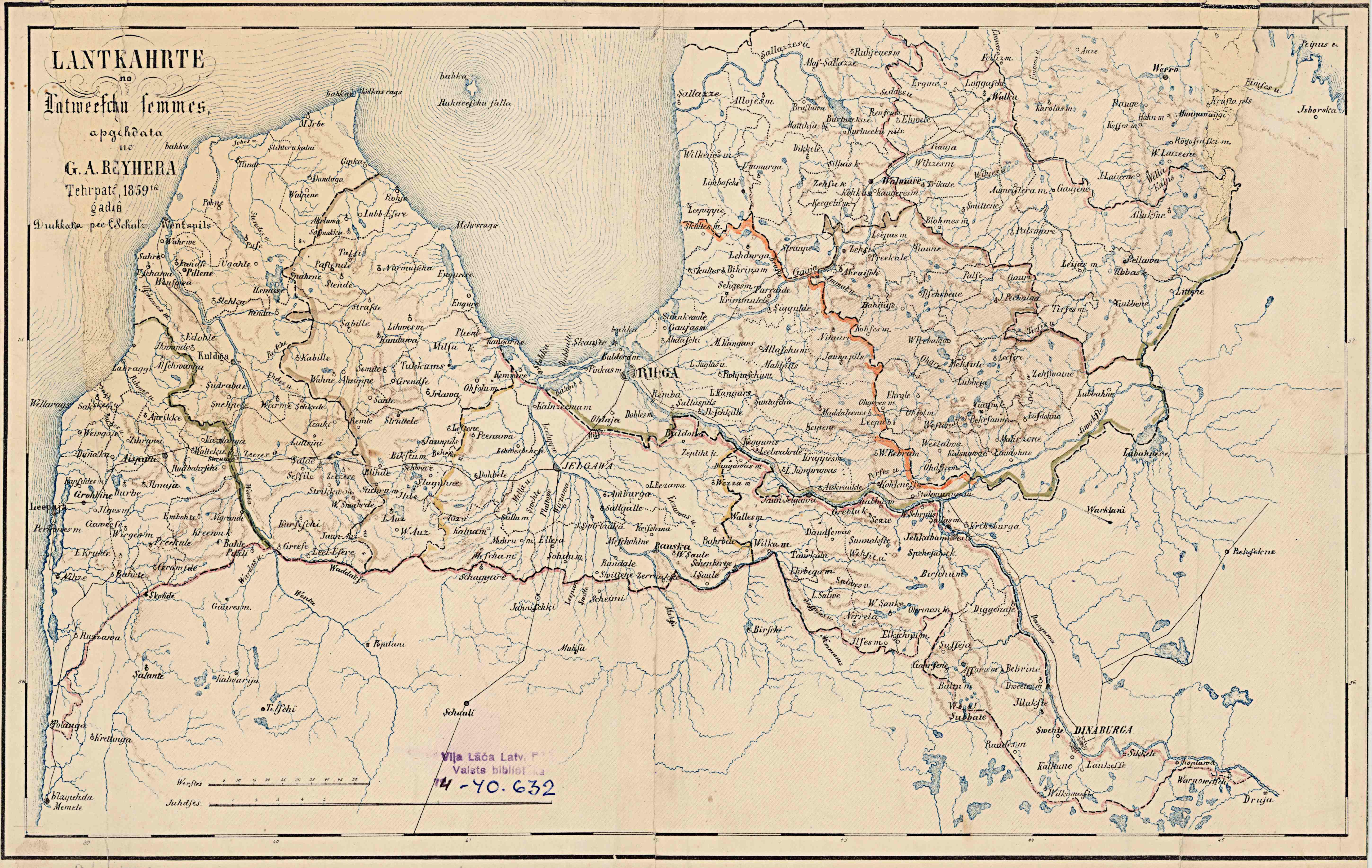 Lantkahrte no Latweeschu semmes 1859